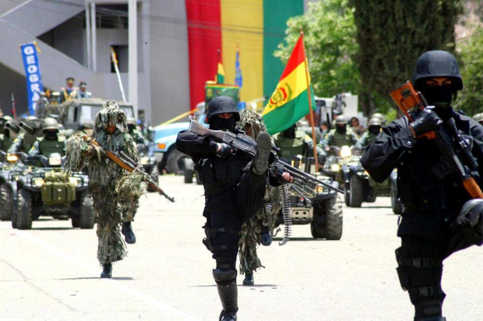 Desfile militar en la paz bolivia